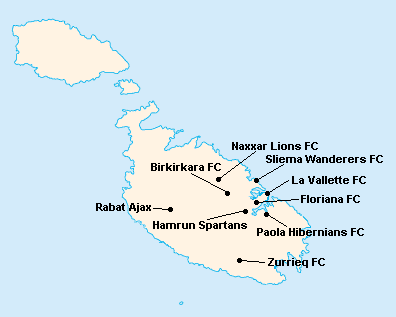 Répartition des clubs en Premier League Maltaise 1988-1991.